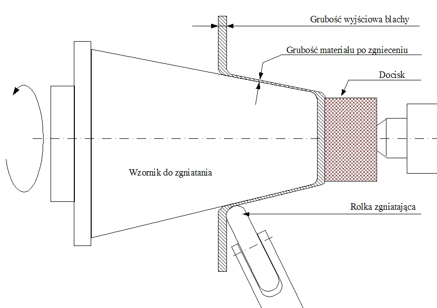 Zgniatanie obrotowe, praca własna wykonana w programie OpenOffice Draw Data:22.04.2007 Autor = Szwedowski